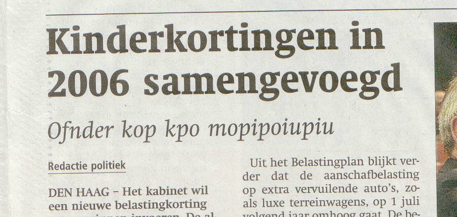 Voorbeeld van een drukfout op de voorpagina van het Reformatorisch Dagblad van 7 september 2005. De ondertitel "Ofnder kop kpo mopipoiupiu" is onbedoeld afgedrukt.De leesbare tekst is erg beperkt en er zit volgens mij geen copyright op de kop die alleen dient ter illustratie.